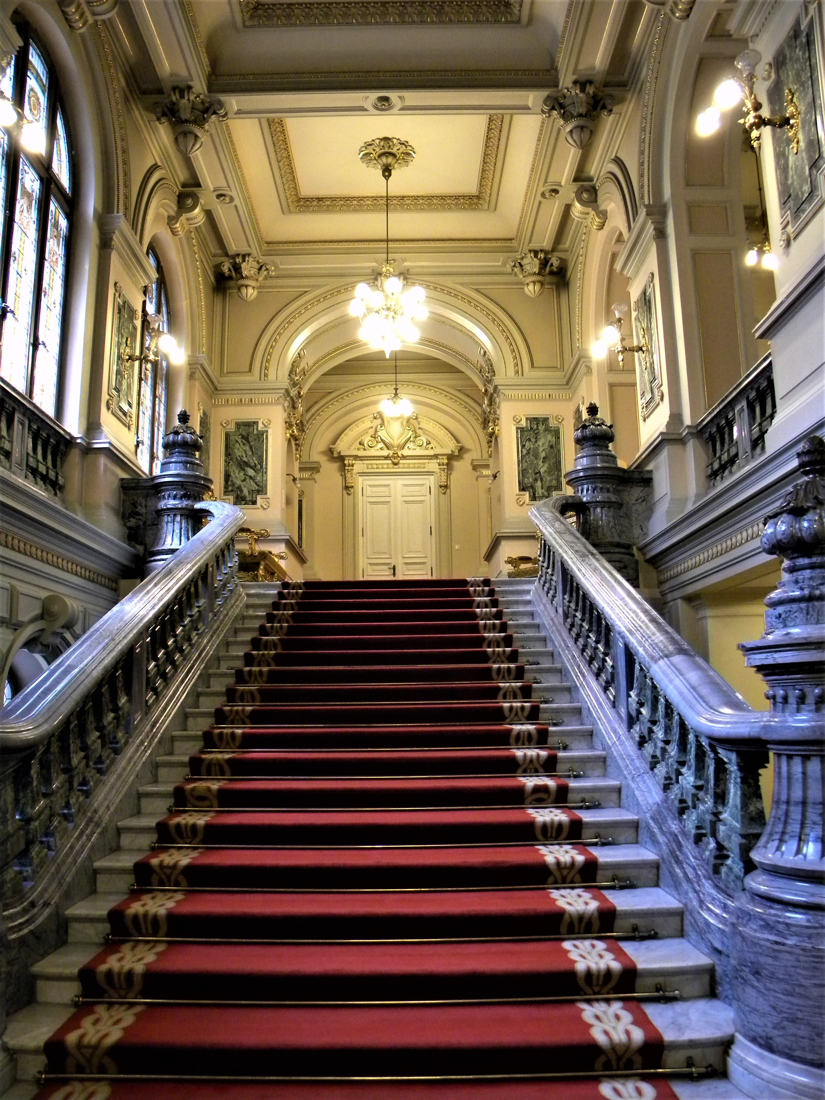 Bucuresti, Romania. MUZEUL NATIONAL COTROCENI. Scara interioara. (B-II-a-A-19152) (3). Muzeul Național Cotroceni este un muzeu din București, România, situat în Palatul Cotroceni, unde pot fi vizitate spații din fosta mănăstire de la Cotroceni și fostul palat regal de la Cotroceni, unde au locuit regele Ferdinand și regina Maria, precum și colecțiile de artă veche decorativă europeană. Ansamblul Cotroceni a fost ridicat între 1679–1681, de către Domnitorul Șerban Cantacuzino (1678–1688). Sub aspect arhitectonic, ansamblul de la Cotroceni cunoaște câteva momente de referință: primul este legat de numele ctitorului Șerban Cantacuzino (1678–1688); al doilea datează din perioada domniei lui Barbu Dimitrie Știrbei (1849–1853, 1854–1856) care, în 1852, îl reface și modernizează şi înființează grӑdina de la Cotroceni (una dintre marile grădini ale Capitalei ); urmează edificarea palatului princiar (1893–1895), de către arhitectul francez Paul Gottereau.